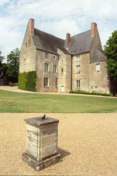 Vista del Château de Saché